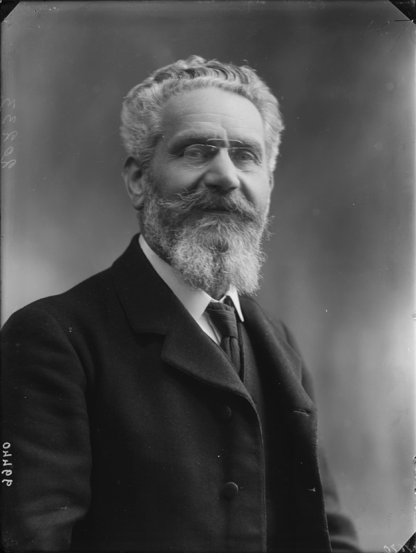 Felice Ramorino fotografato da Mario Nunes Vais